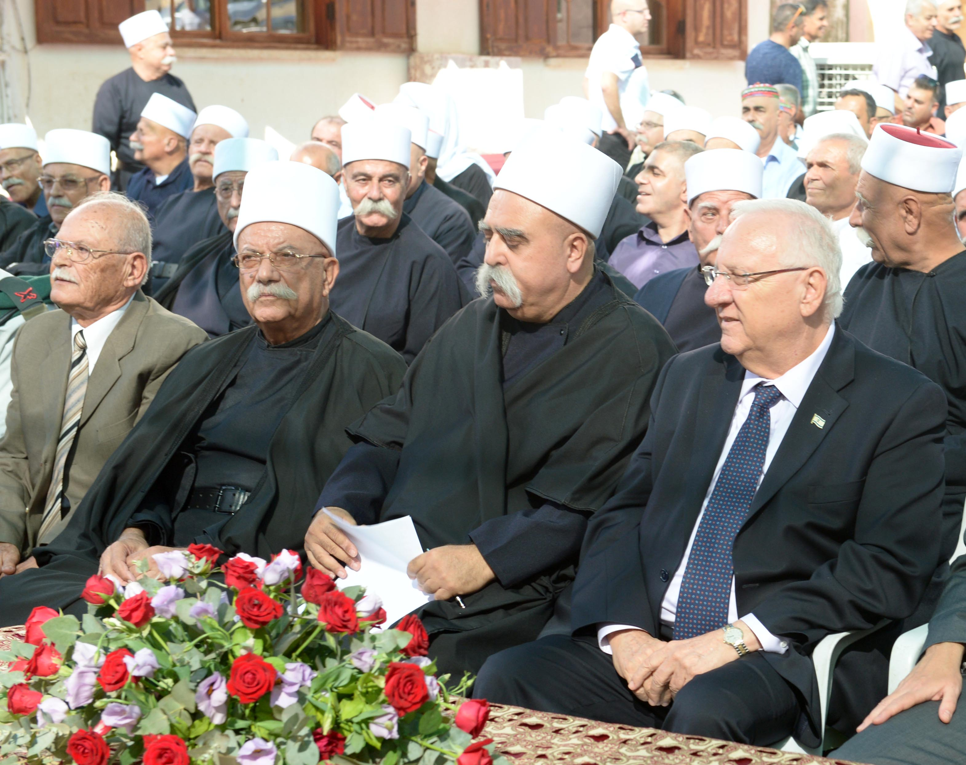 נשיא מדינת ישראל ראובן ריבלין באירוע המרכזי לרגל חג הקורבן הדרוזי בהשתתפות השייח' מואפק טריף מנהיג העדה בישראל ומאות מוזמנים מנכבדי העדה.